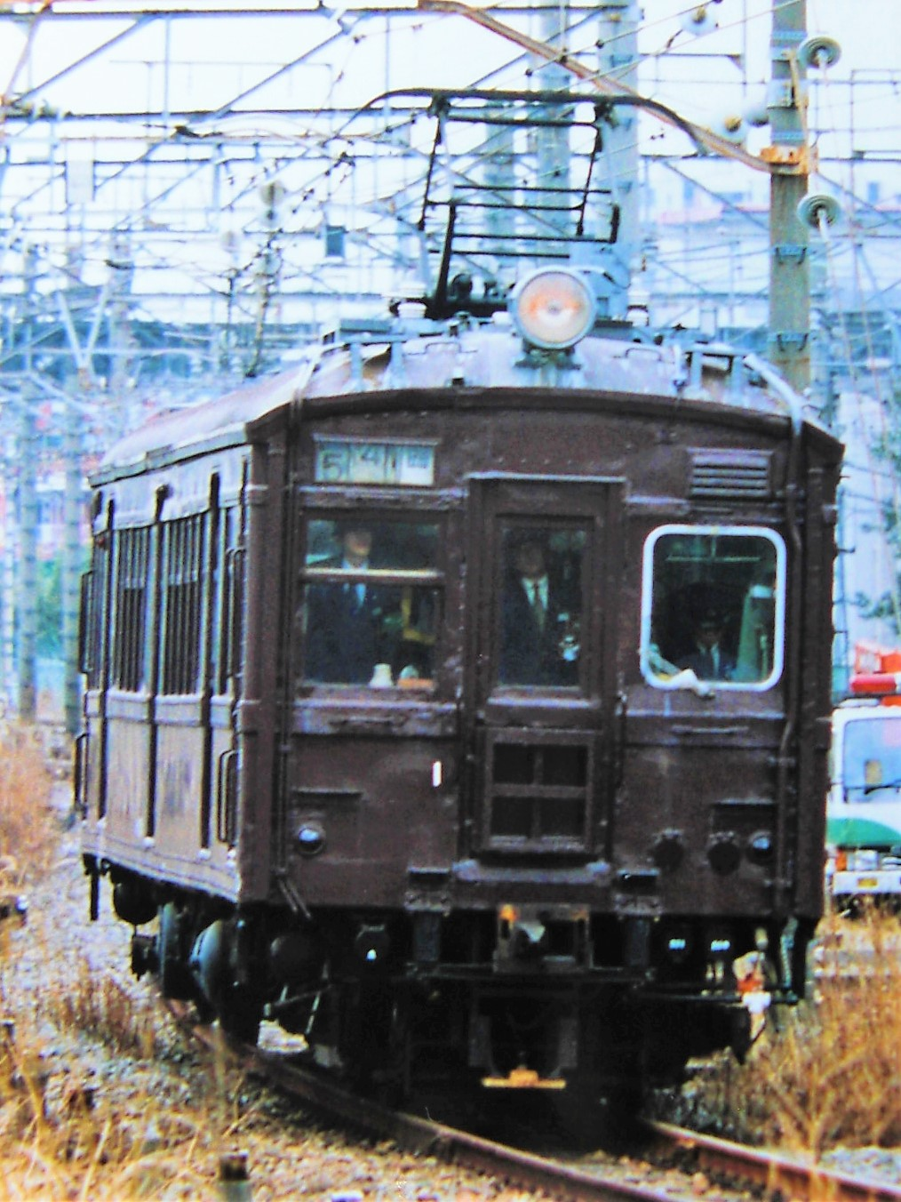 鉄道省 モハ40形電車 40054